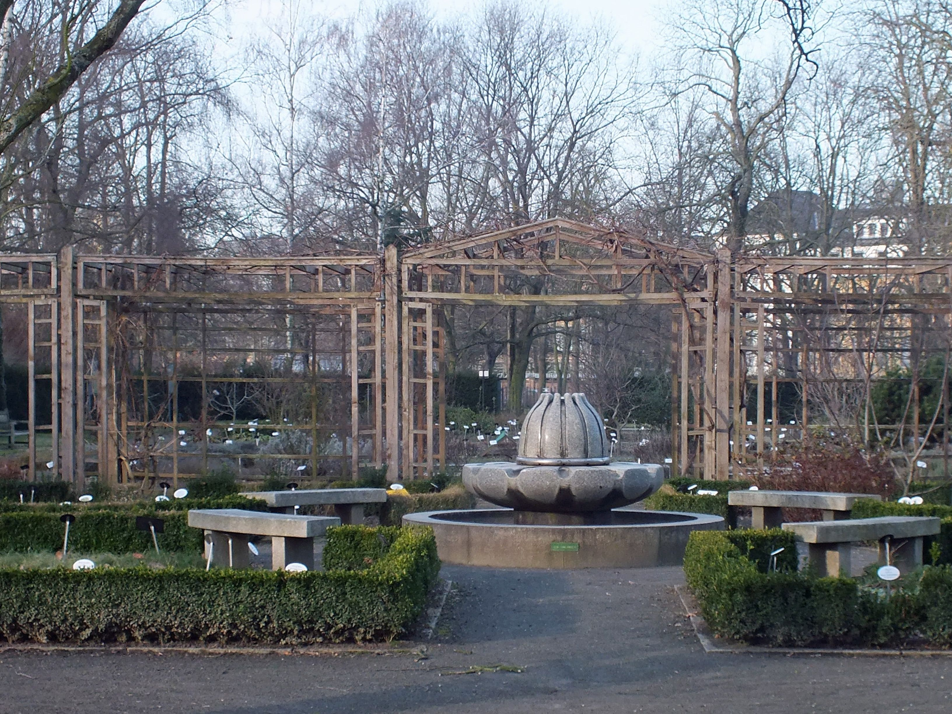 Der Apothekergarten im Friedenspark in Leipzig